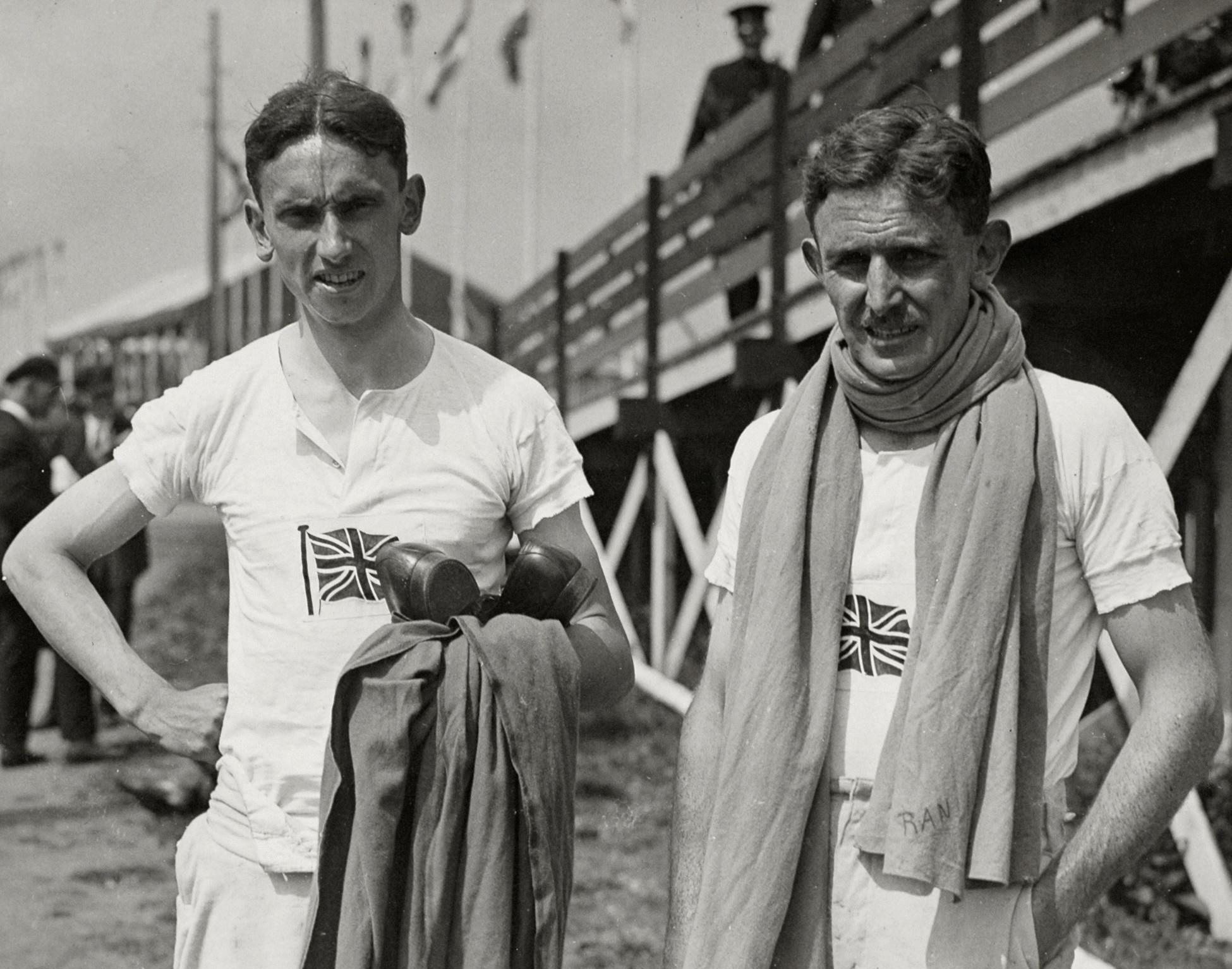 Olympische Spelen Amsterdam, Nederland, 1928: Roeien. T. O' Brien en R.A. Nisbet werden 2e op het onderdeel twee zonder stuurman